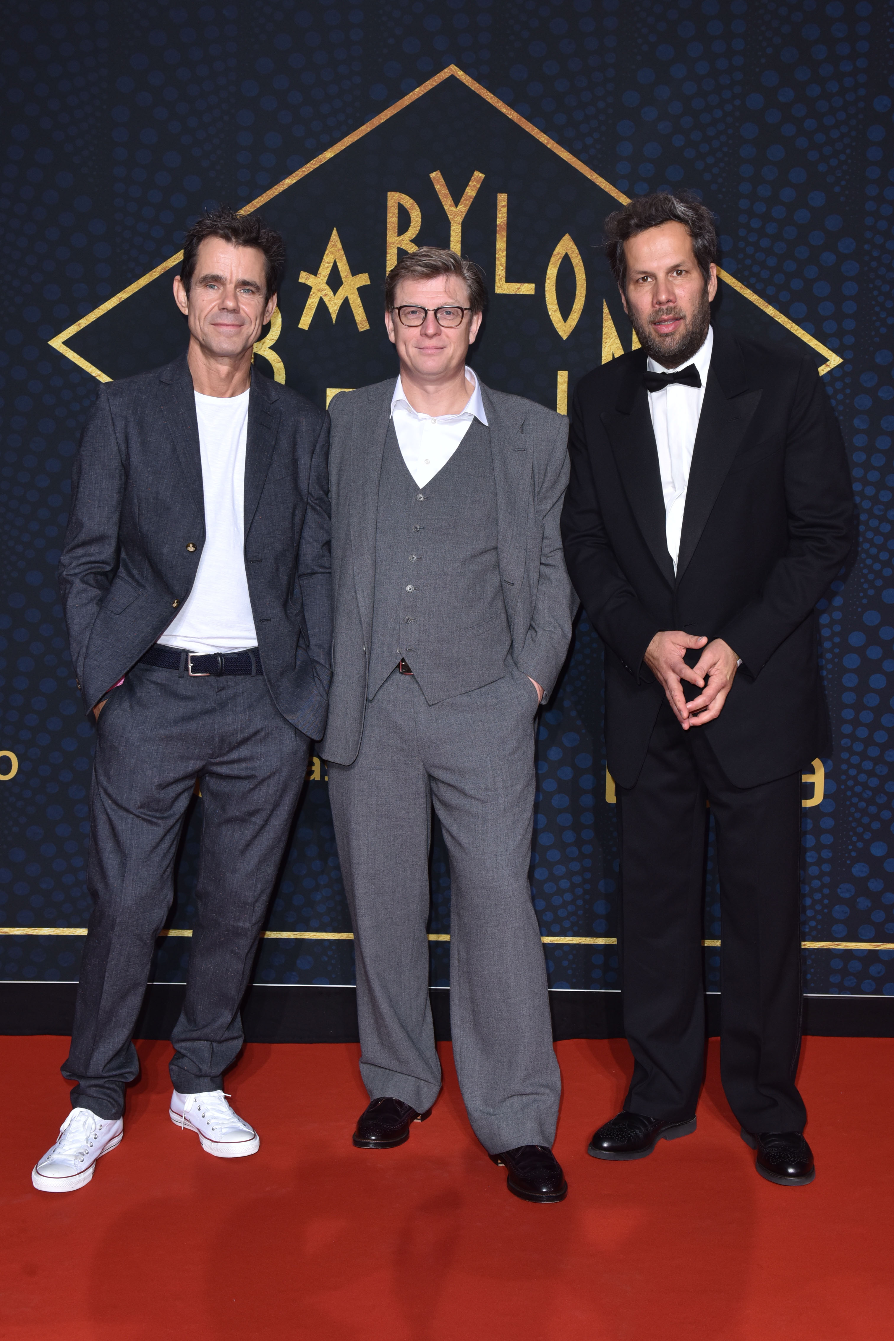 Tom Tykwer, Hendrik Handloegten und Achim von Borries auf der Premiere von "Babylon Berlin" im Berliner Ensemble Agency People Image (c.) Daniel Hinz